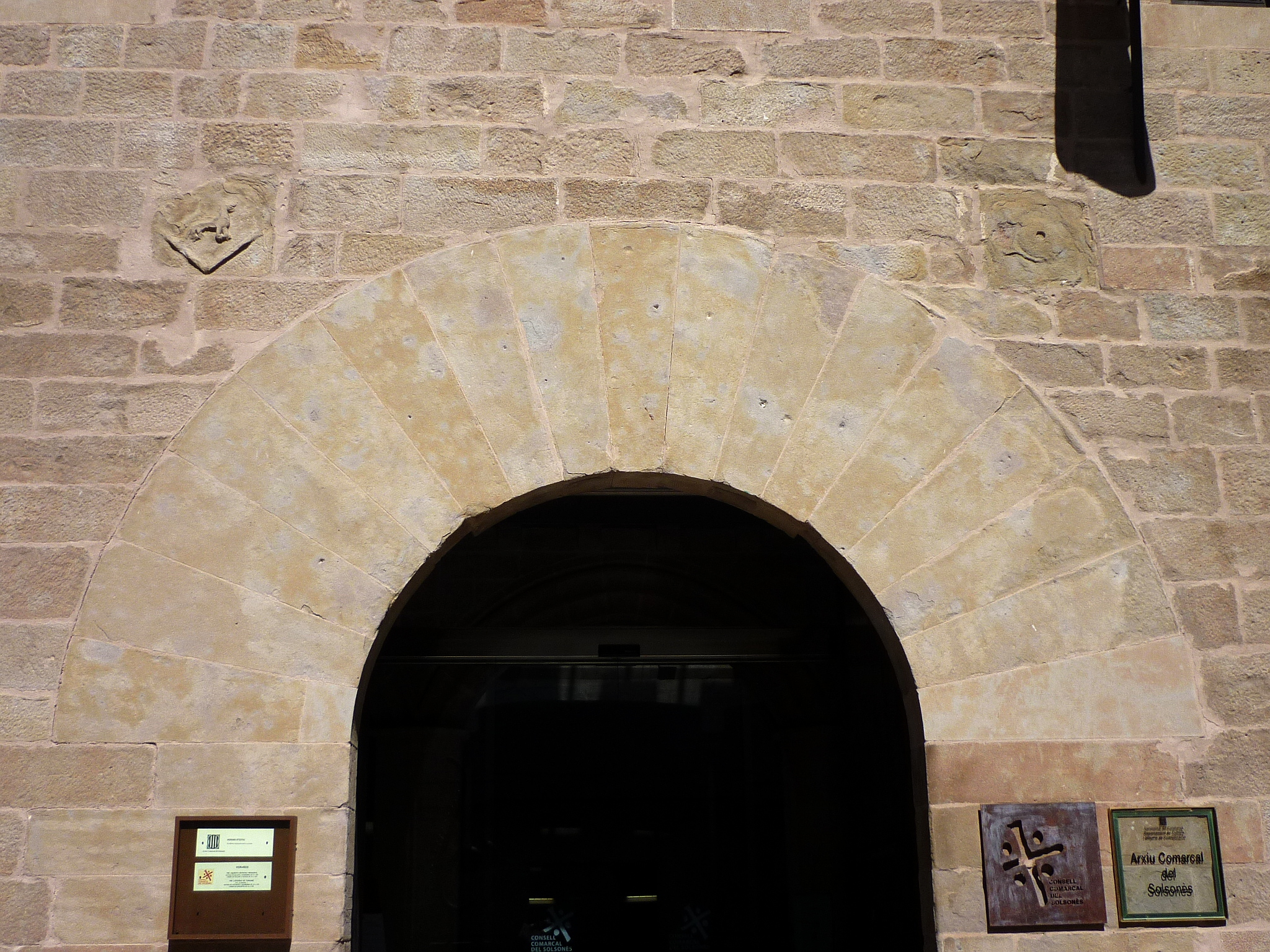 Els Dominics (Solsona)